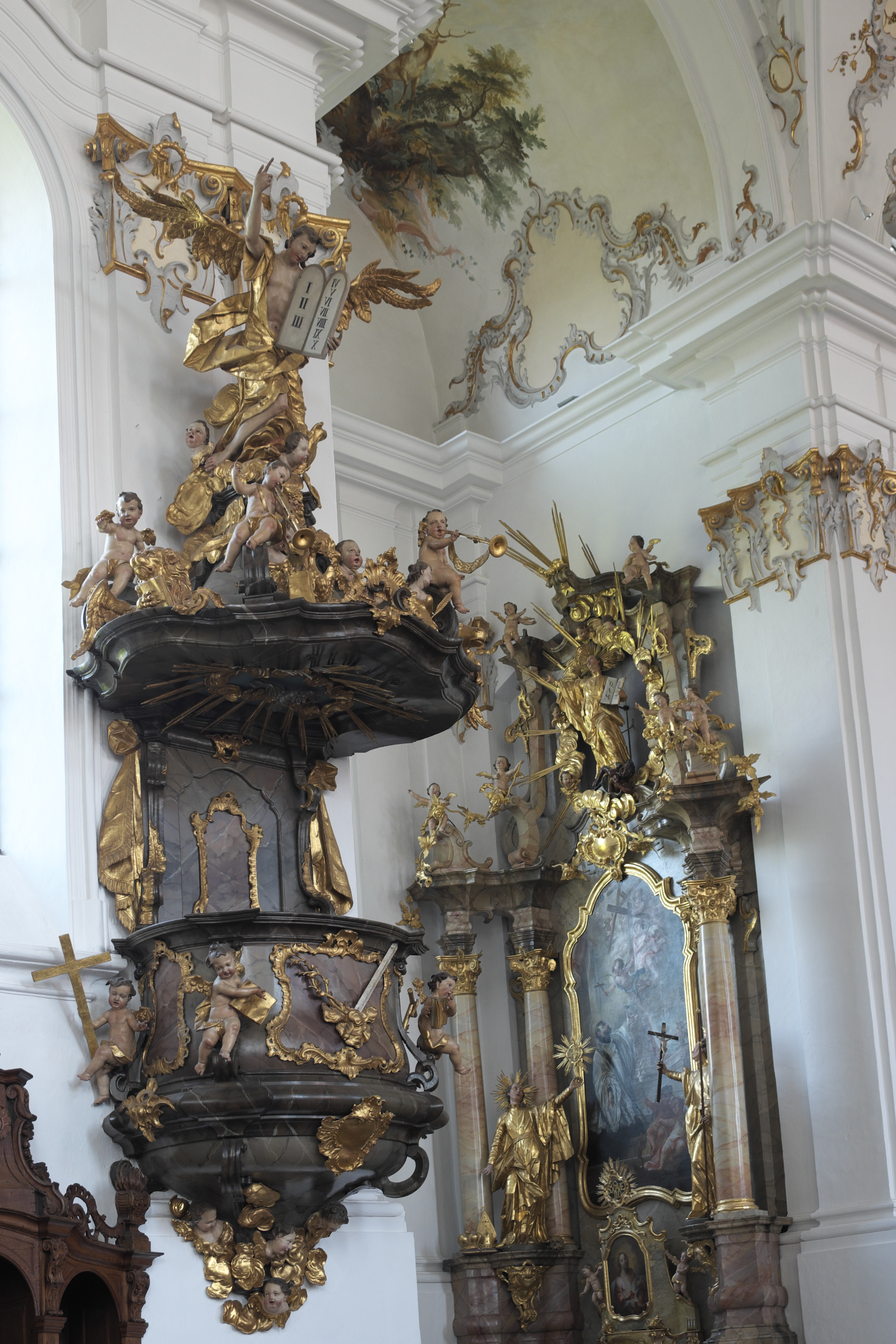 Wallfahrtskirche Heilig Kreuz, ehemalige Klosterkirche des Klosters Bergen in Bergen, einem Ortsteil von Neuburg an der Donau im Landkreis Neuburg-Schrobenhausen (Bayern), Kanzel von Jakob Steinle, nach Entwürfen von Johann Michael Fischer